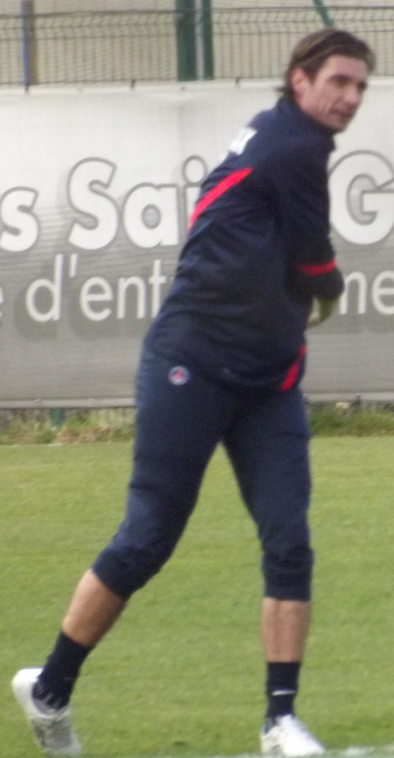 Sous les couleurs du PSG